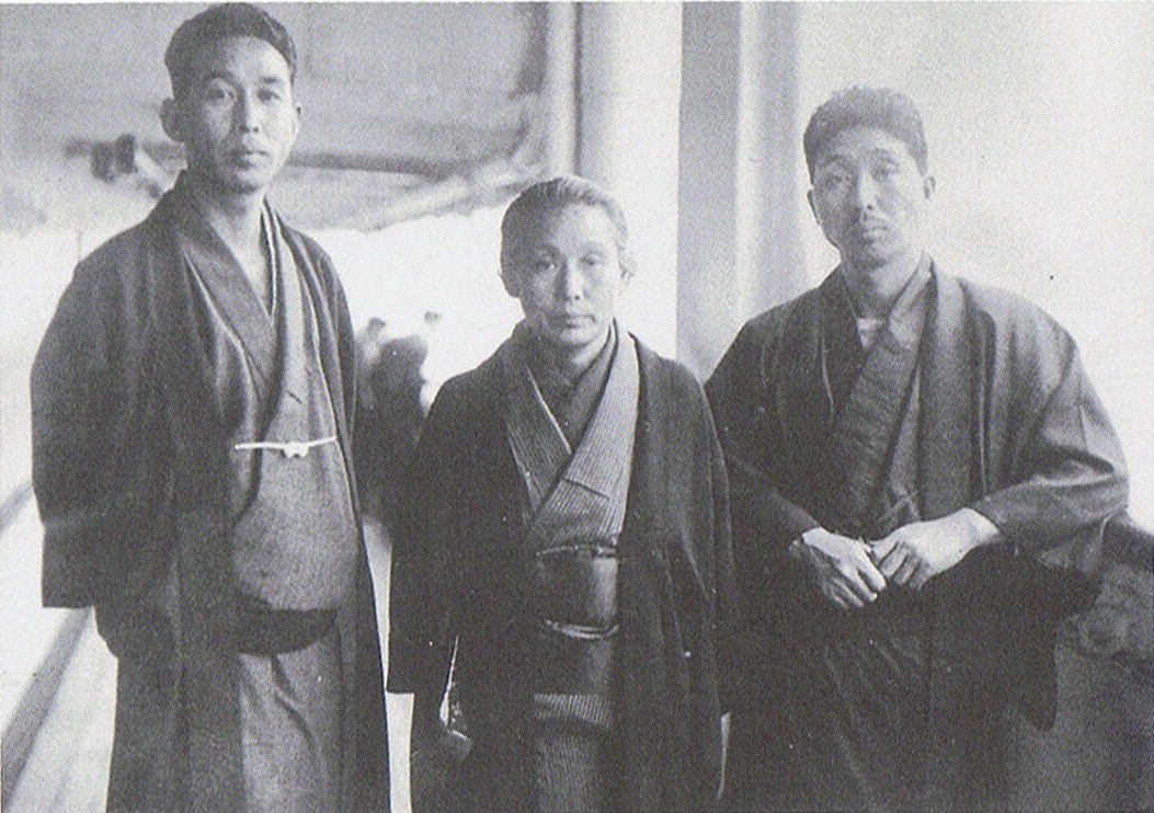 （左）宮崎震作、（中央）宮崎槌子、（右）宮崎龍介。 順に宮崎滔天の次男・妻・長男。